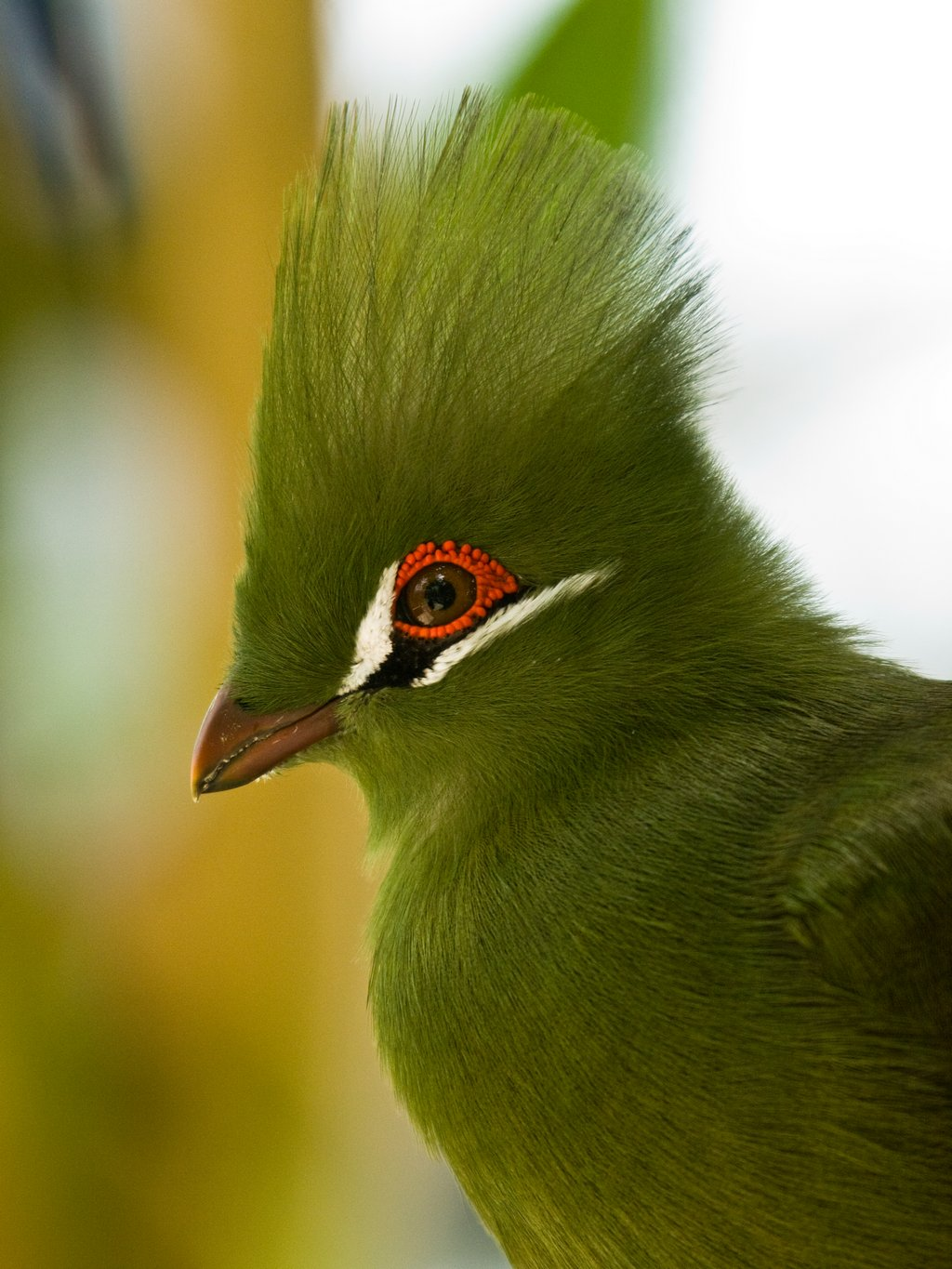 Guinea Turaco (Tauraco persa)